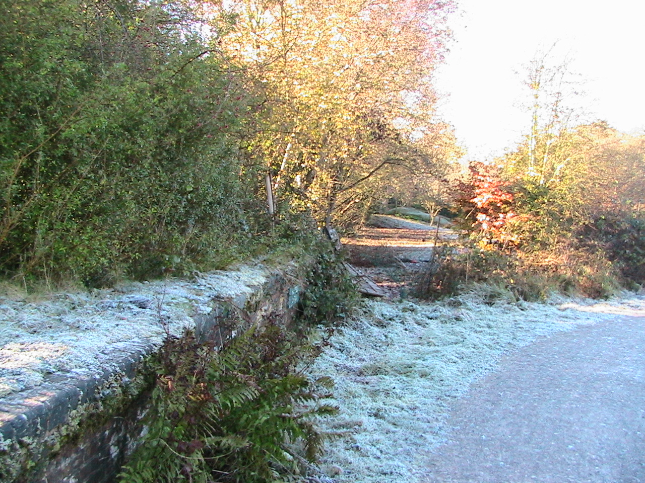 Taken by Anthony Zacharzewski, 19 November 2005